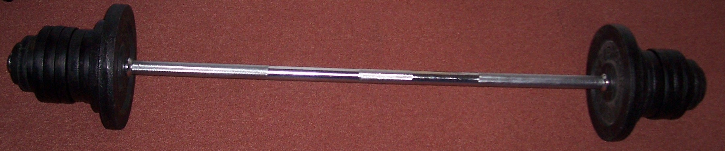 Barbell, total weight 156 lbs (71 kg totaalgewicht)